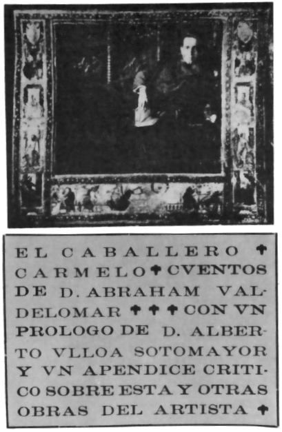 Foto de la cubierta del libro "El caballero Carmelo" (1918) de Abraham Valdelomar (1888-1919).